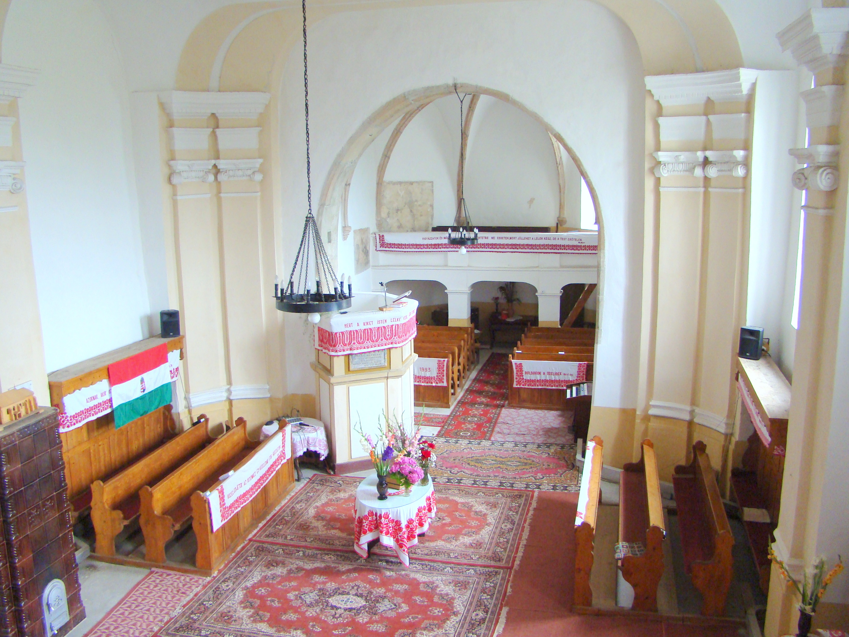 Reformed church in Reteag, Bistrița-Năsăud county, Romania